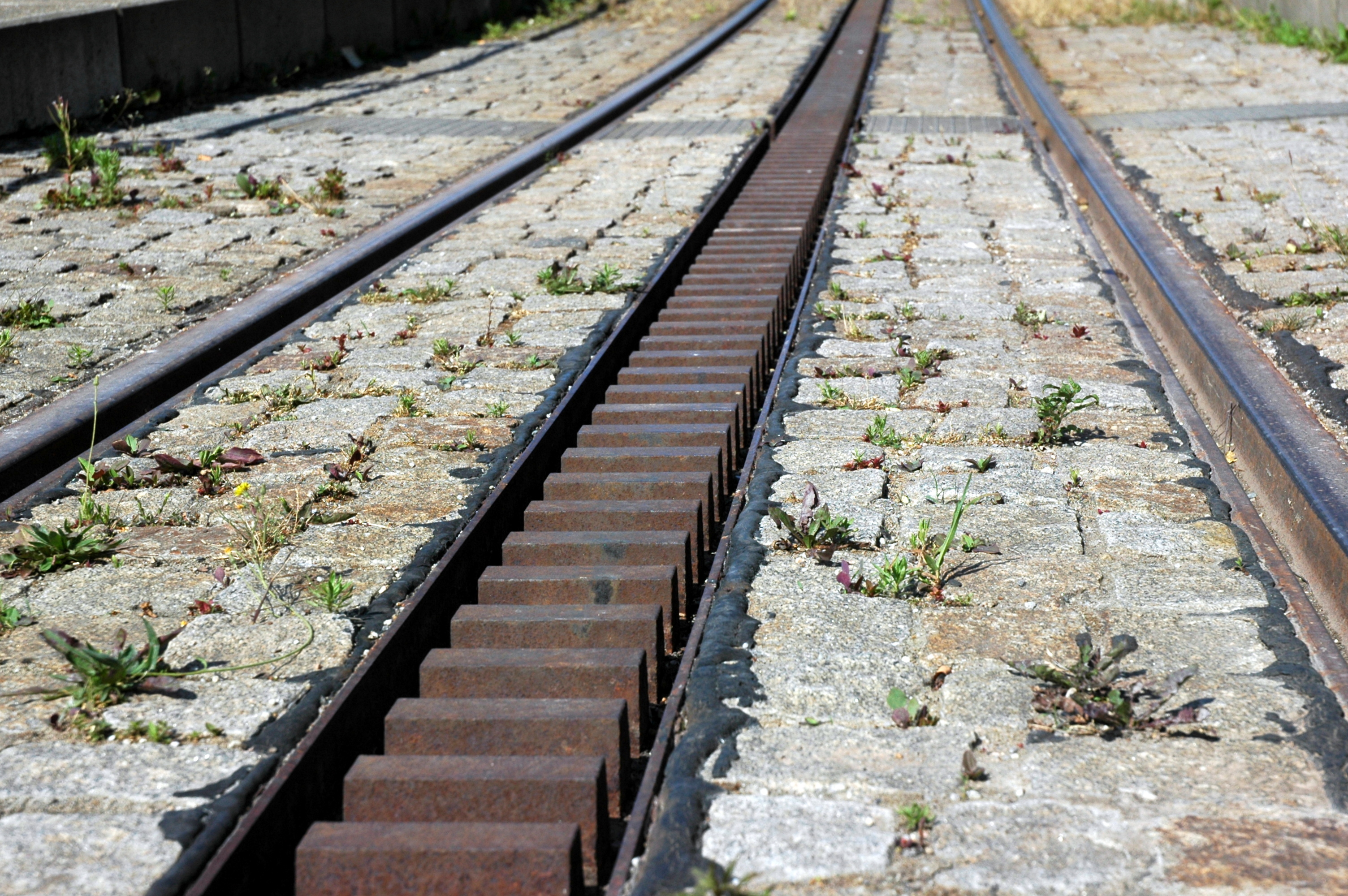 Zahnradbahn Stuttgart